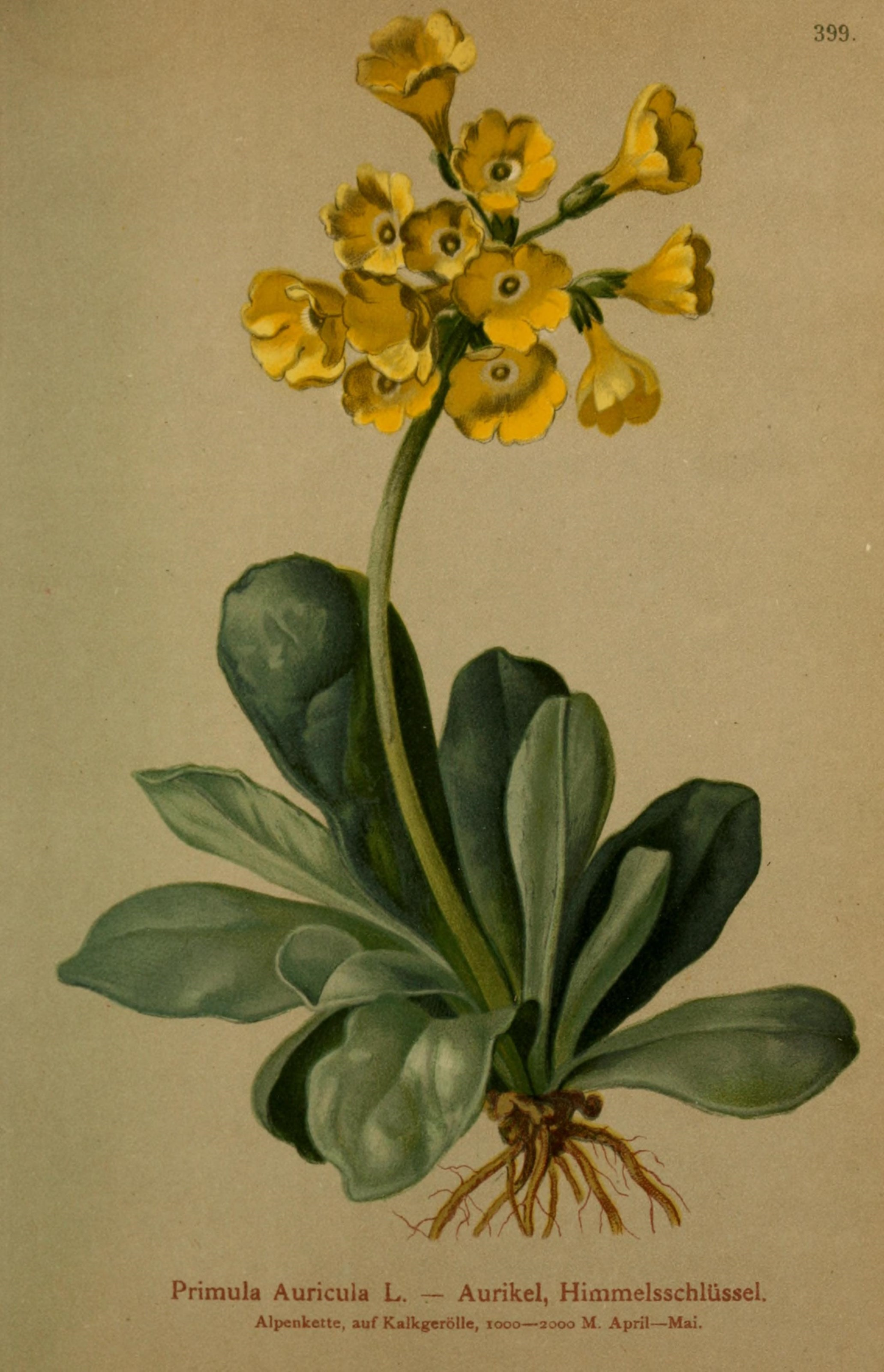 399. Primula Auricula L. — Aurikel, Himmelsschlüssel. Alpenkette, auf Kalkgerölle, looo — 2.^00 M. April — Mai.